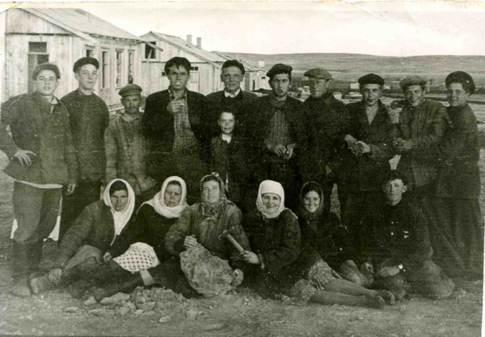 Закладка первой улицы села Богдановское, Кизильский район